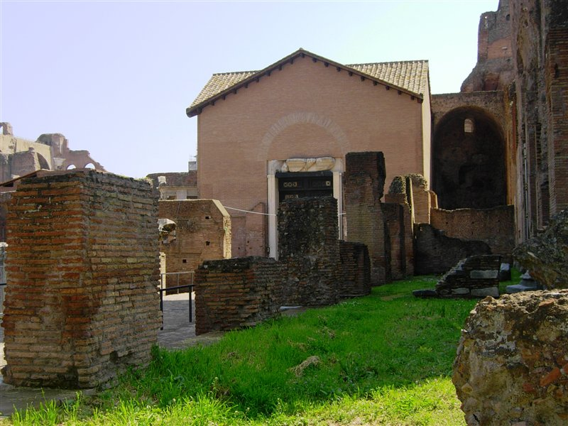 Rome Roman Forum